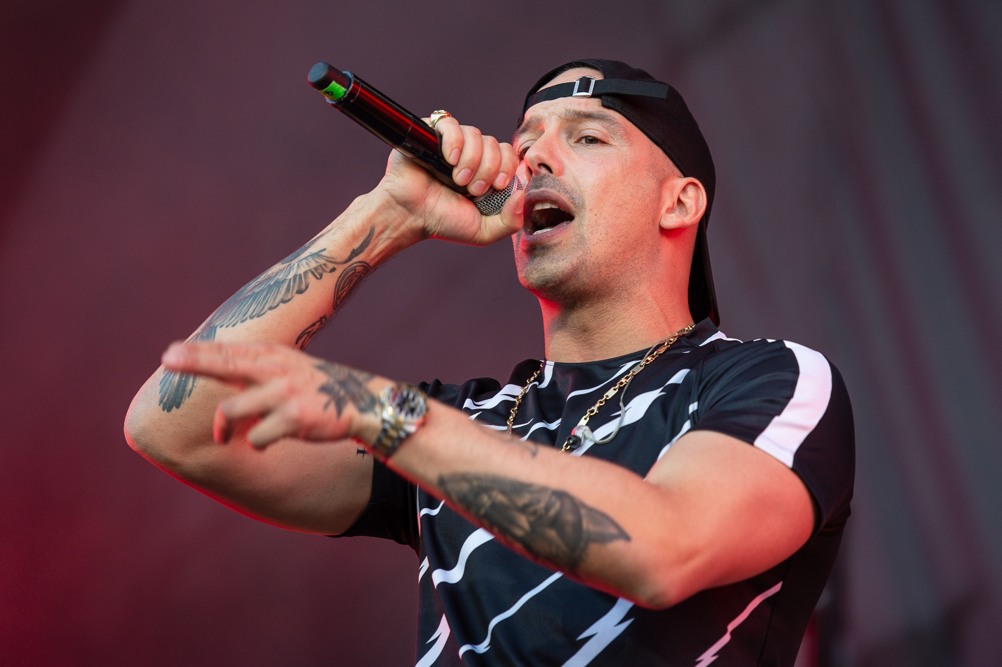 ARGO-Konzerte,Beck's Park Stage,Festival,Konzert,Livekonzert,Livemusik,Musik,RAF Camora,RiP,Rock im Park 2018